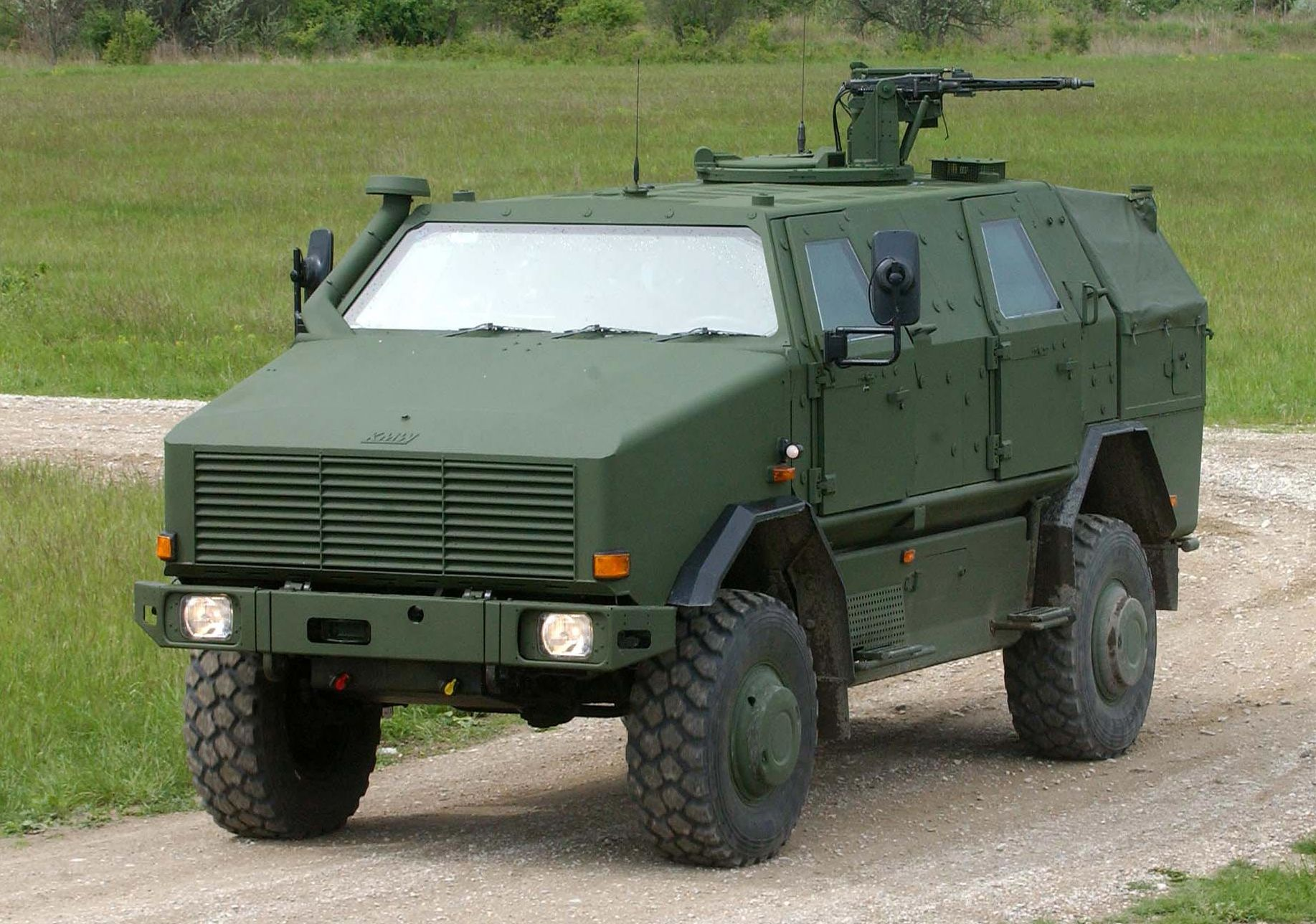 Foto van de nieuwe Dingo II, licht pantservoertuig